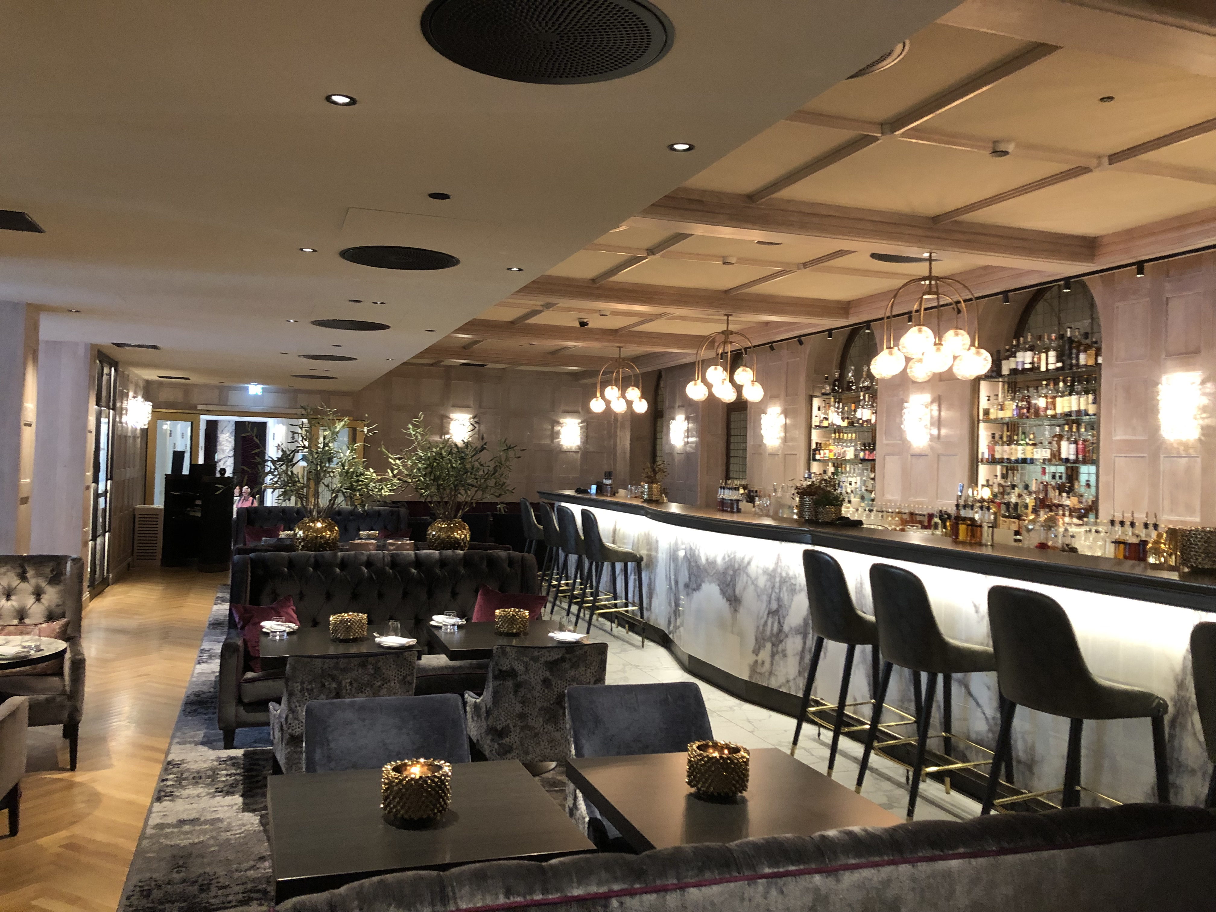 Britannia Hotel i Trondheim, etter oppussingen 2016-2019.